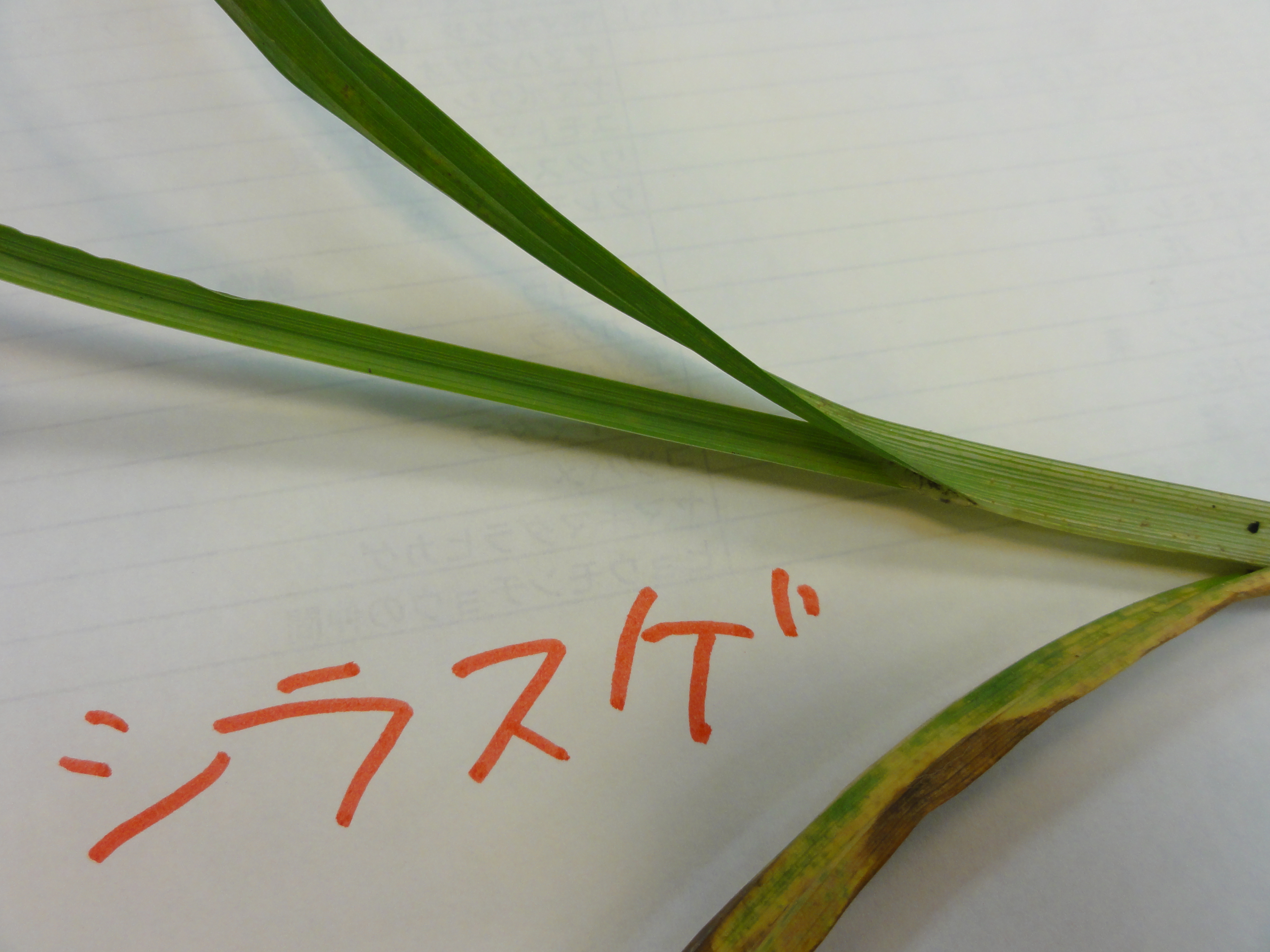 シラスゲ[Carex alopecuroides var. chlorostachya]-葉付け根